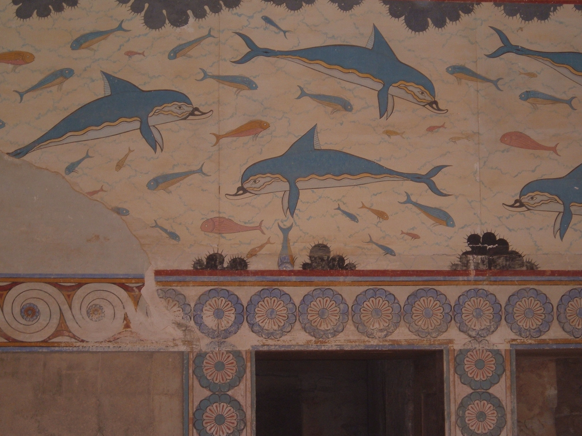 Photo des dauphins reconstitués par Evans